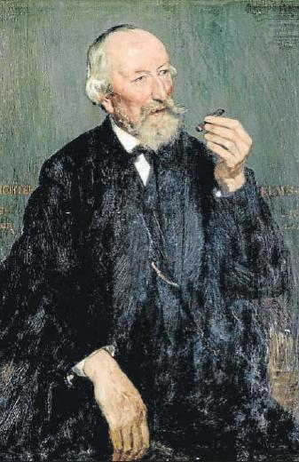 Bildnis Klaus Groth von Christian Ludwig Bokelmann (1891)